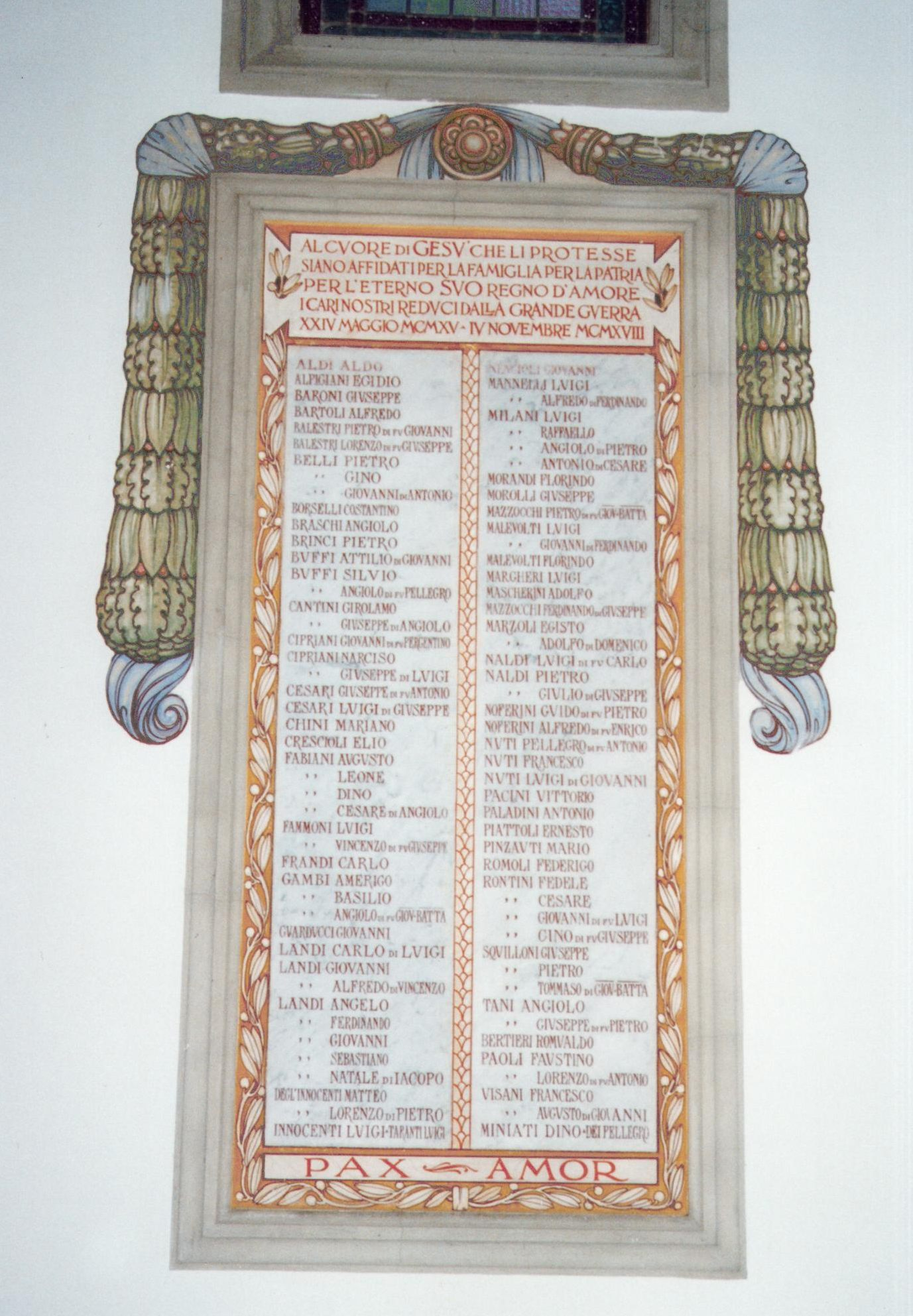 Dino Chini, Lapide ai caduti della Grande Guerra